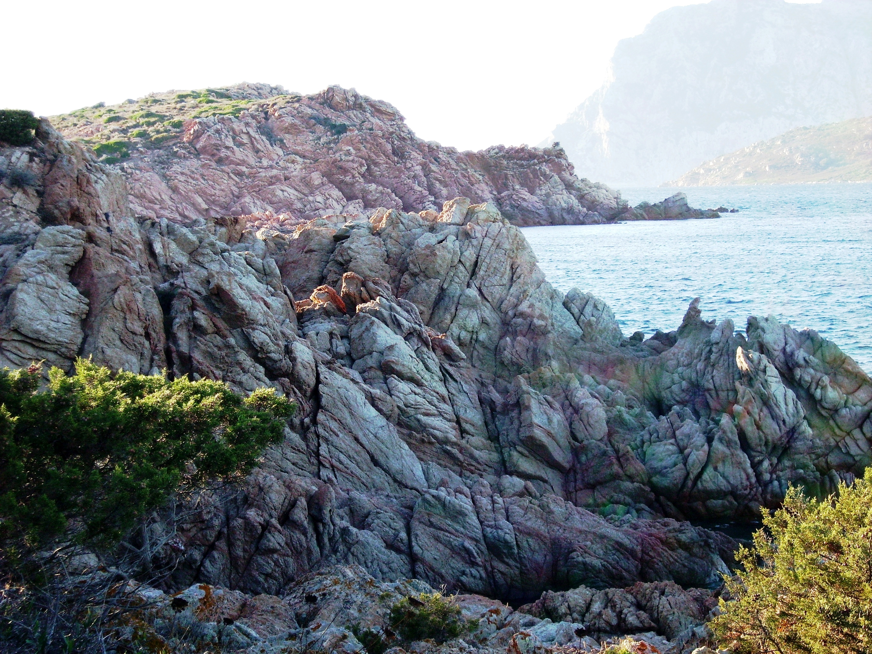 Sardinia - Italy - San Teodoro Scogliere rosa a Capo Coda Cavallo; sullo sfondo la sagoma dell'isola di Tavolara.